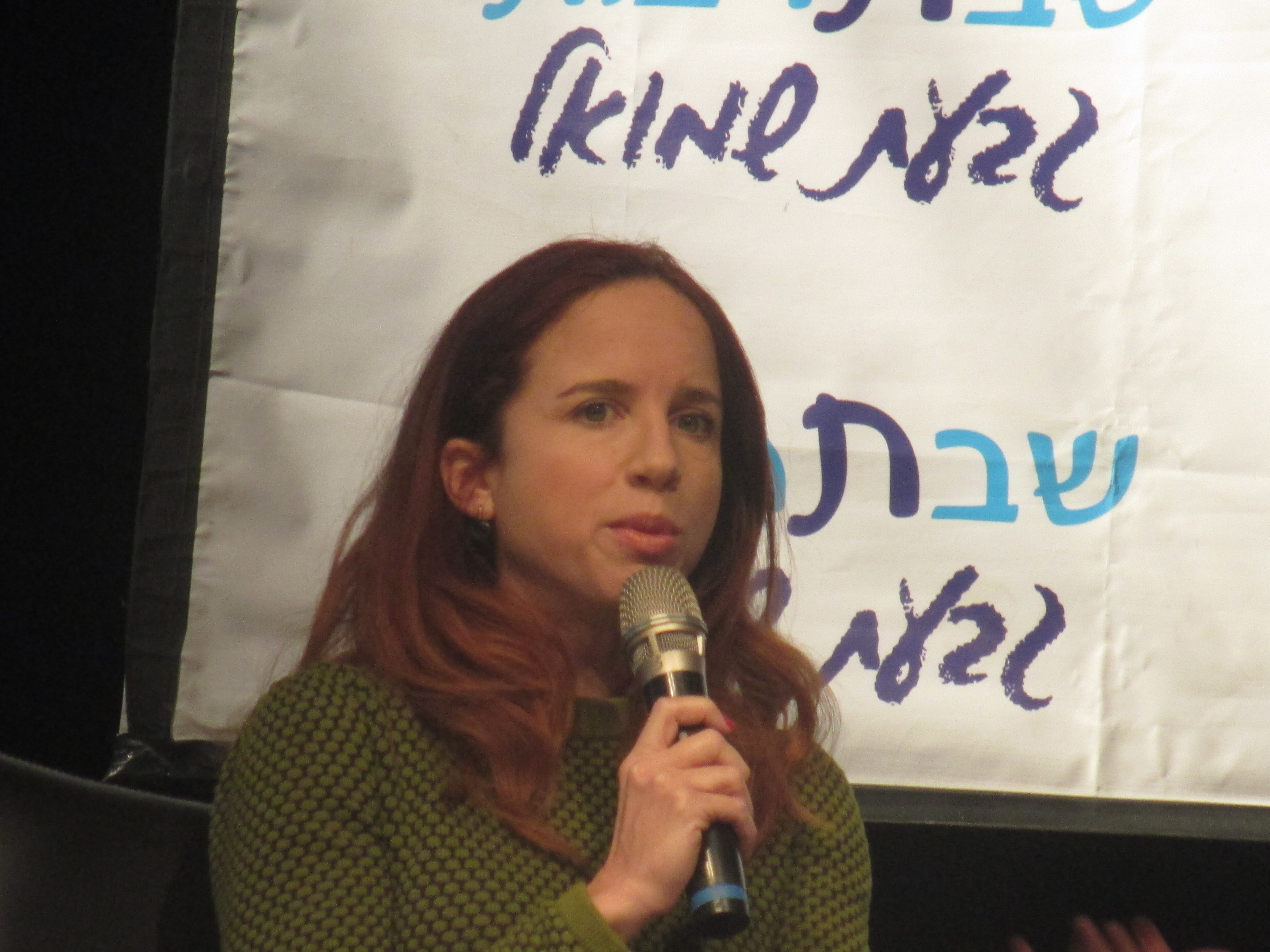 ח"כ סתיו שפיר באירוע שבתרבות בגבעת שמואל